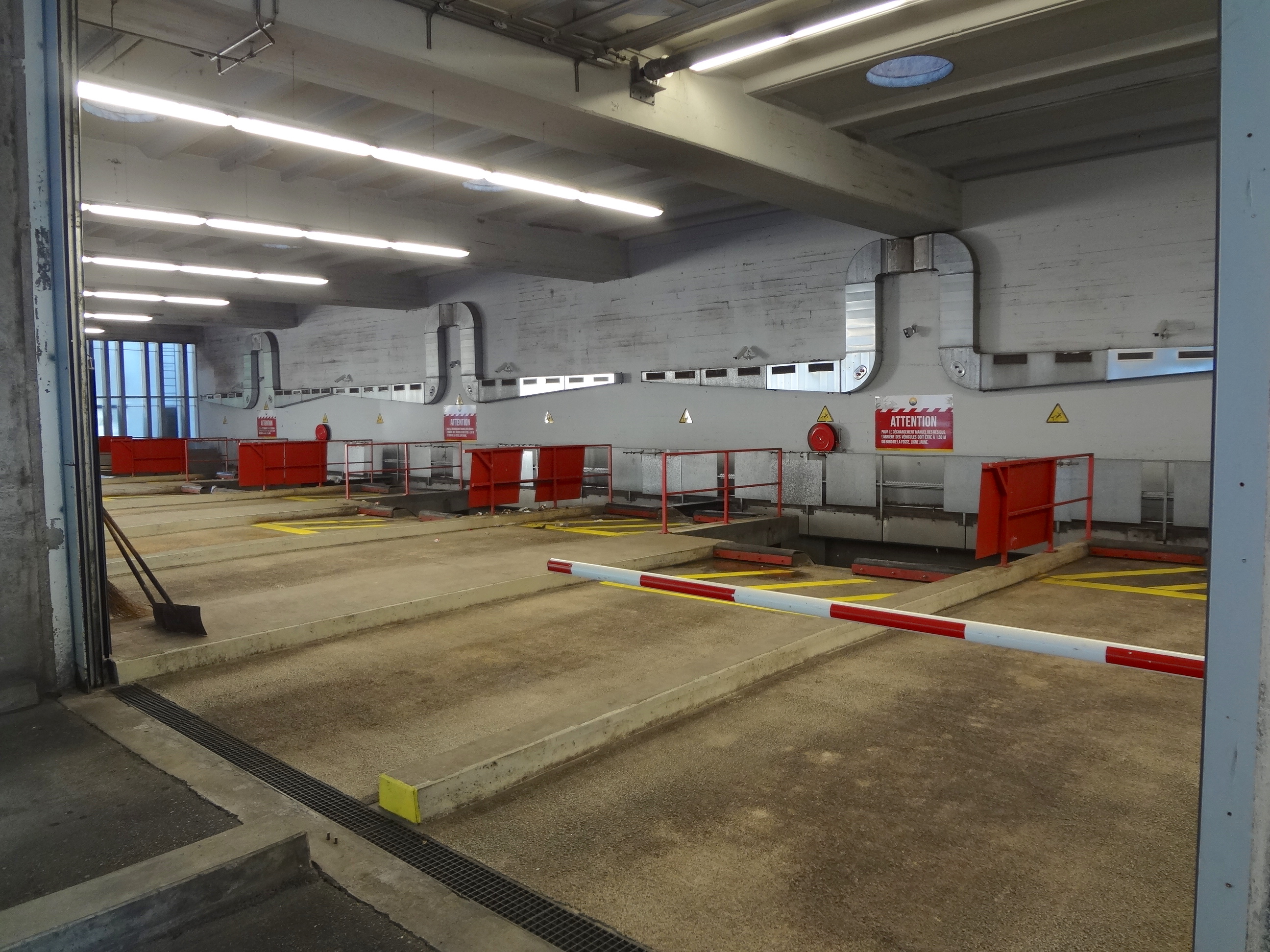 Services industriels de Genève : quai de chargement de la Jonction : les ordures ménagères, et autres, sont transportées de là par barge jusqu'à l'Usine d’incinération des Cheneviers.